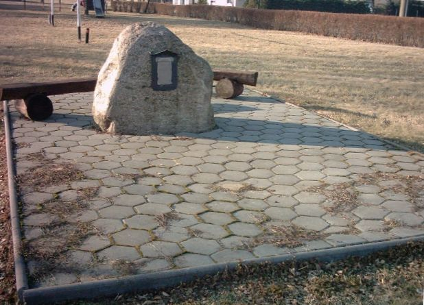 Gedenkstein mit Gedenktafel an einem alten Fundamentstein der alten Hathenower Kirche, 1997